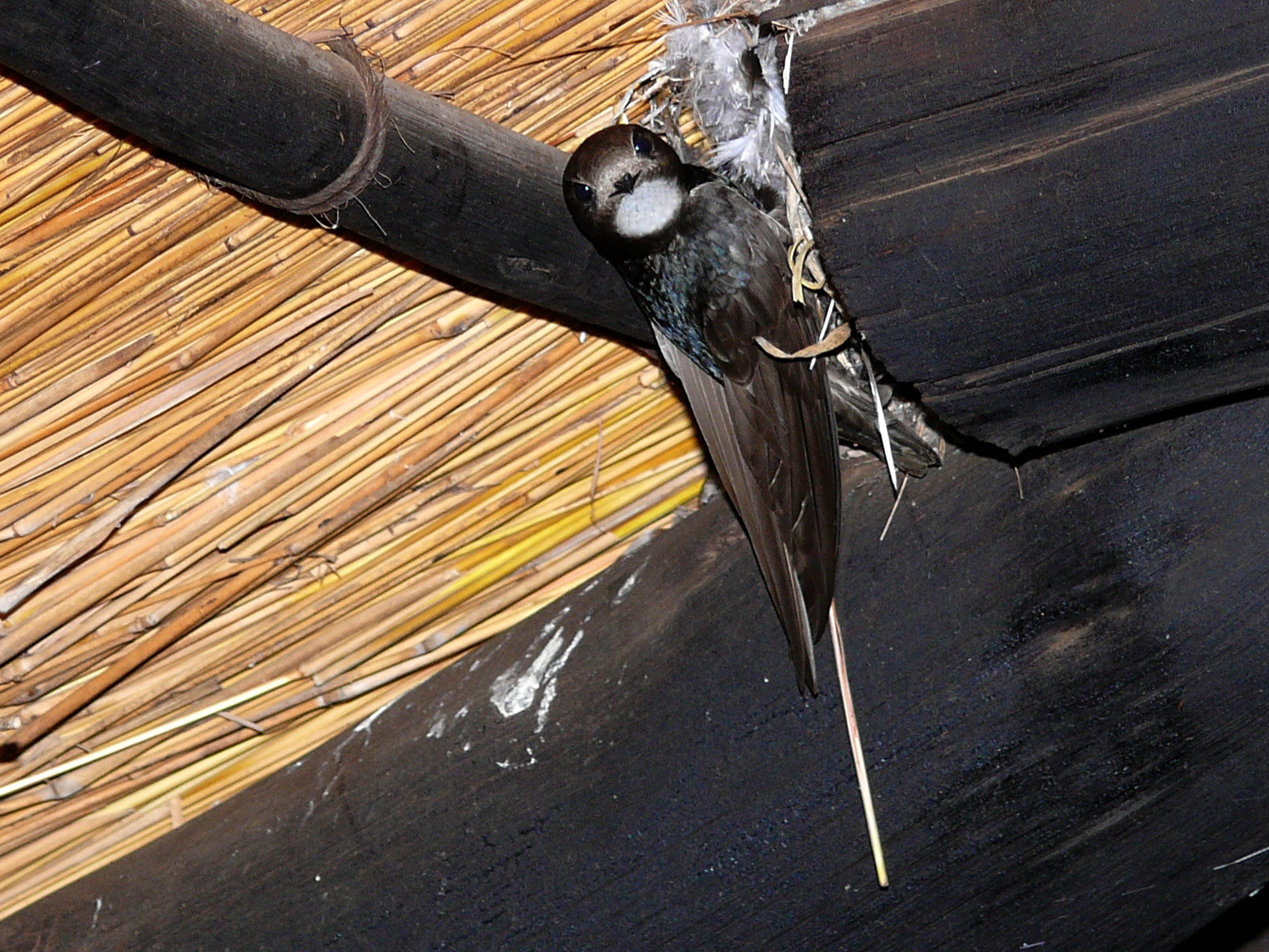 Mlondozi Dam Picnic Site, Kruger NP, SOUTH AFRICA